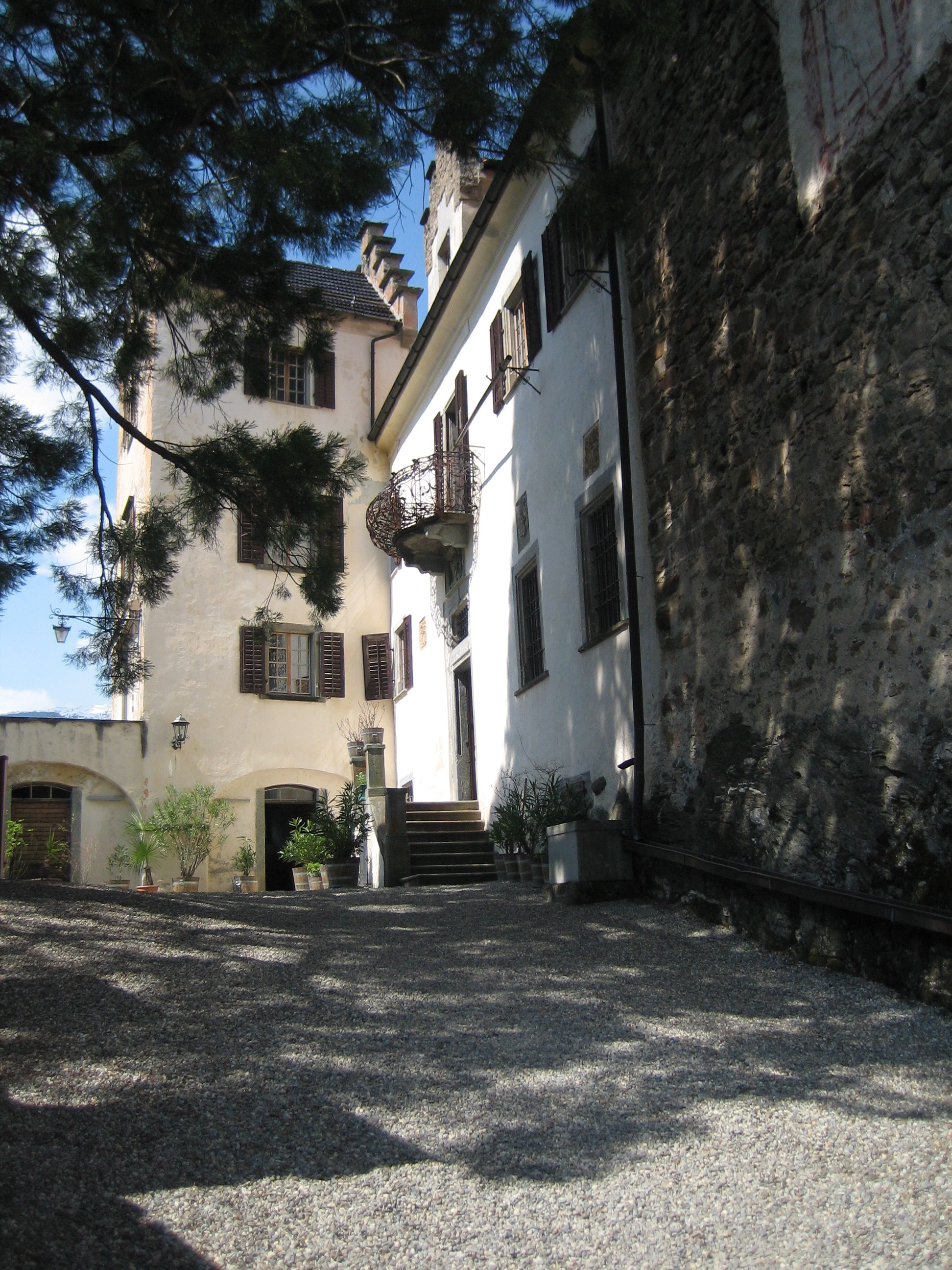 Schloss Baldenstein, Hof